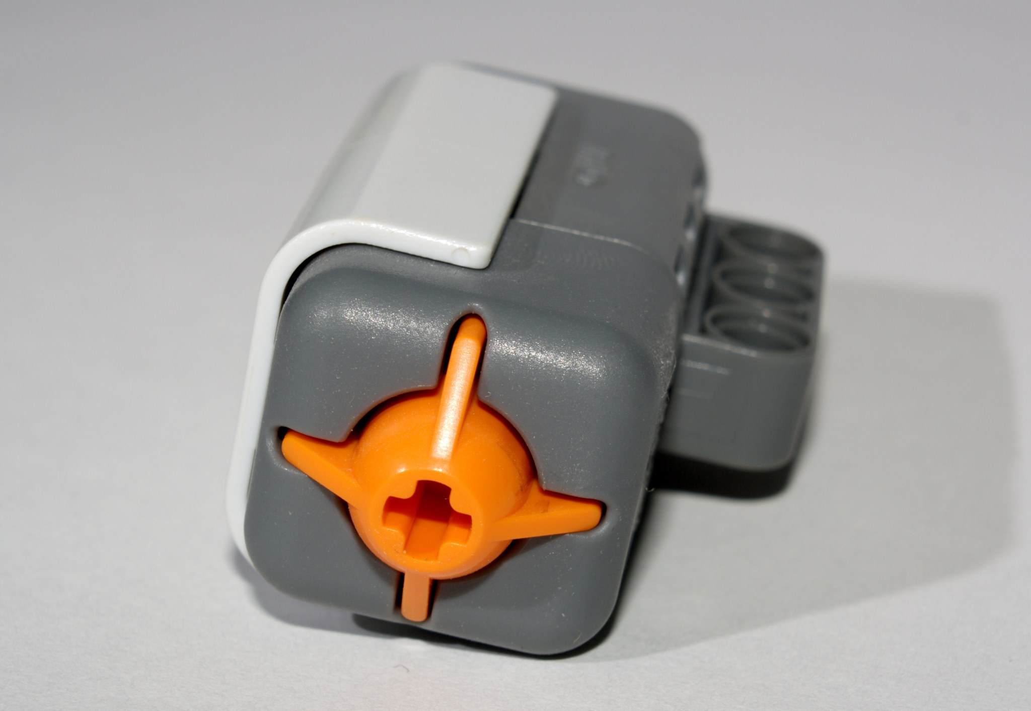 Lego Mindstorms NXT Tastsensor